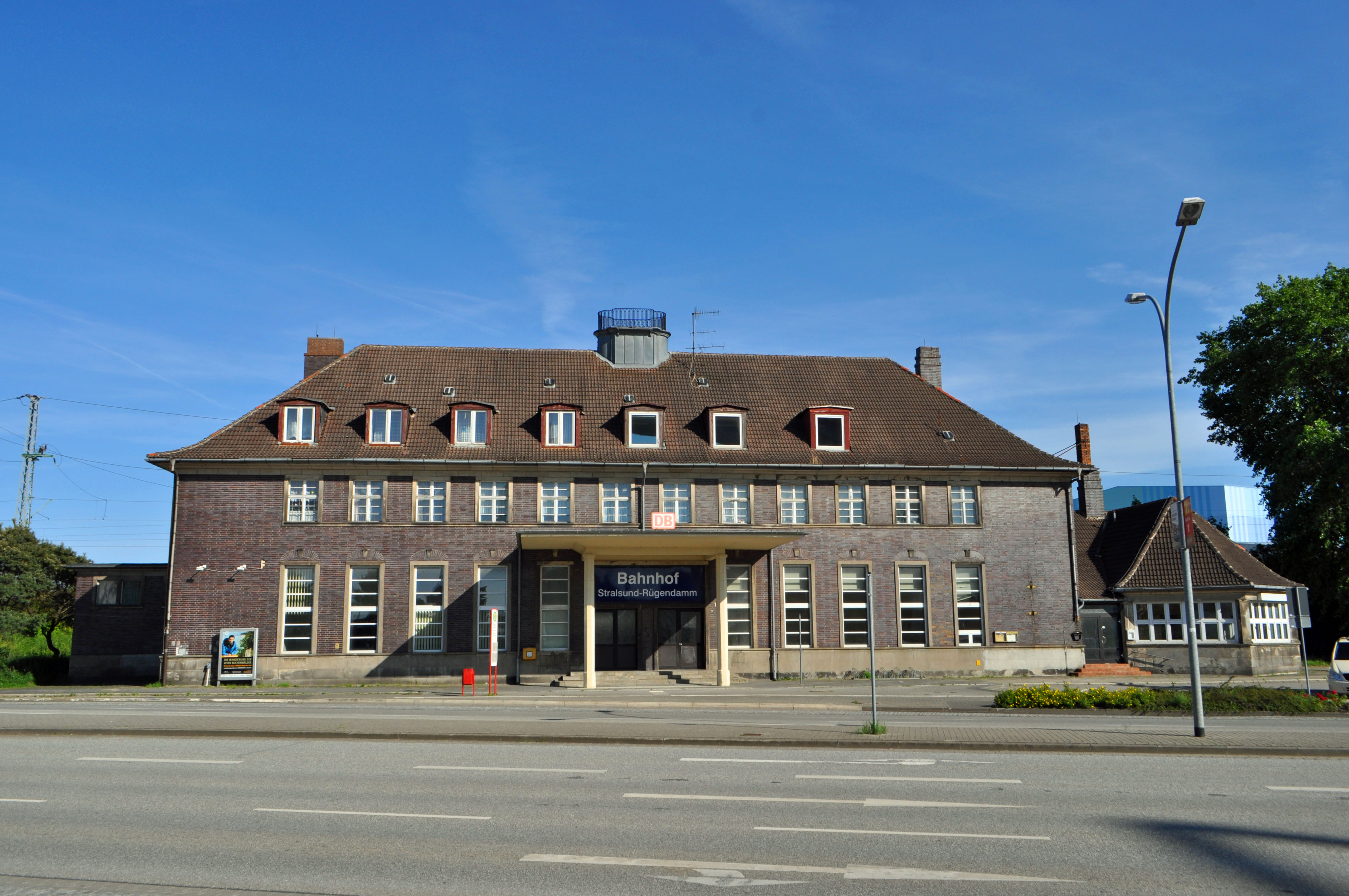 Stralsund, Rügendammbahnhof